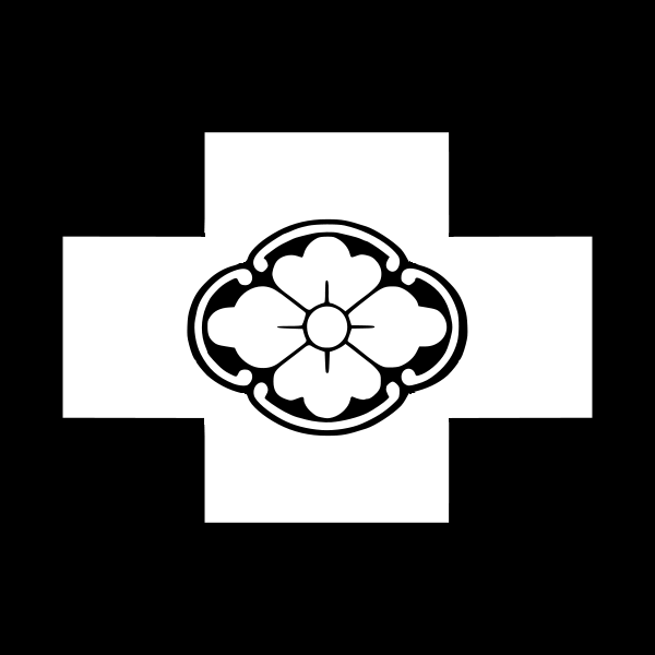 常磐津の流紋（定紋）である「角木瓜（かくもっこう）」。